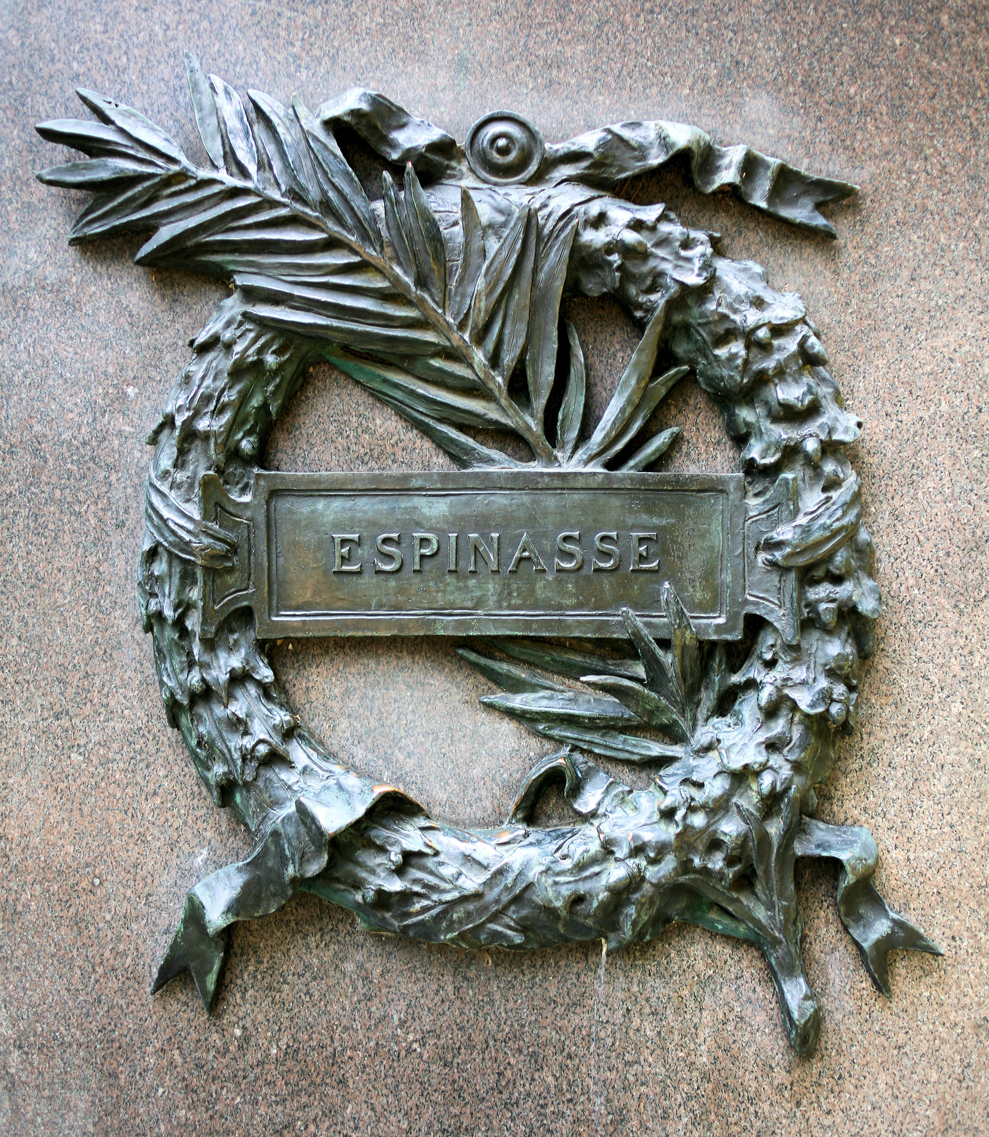 Corona al generale Espinasse sul monumento a Napoleone III